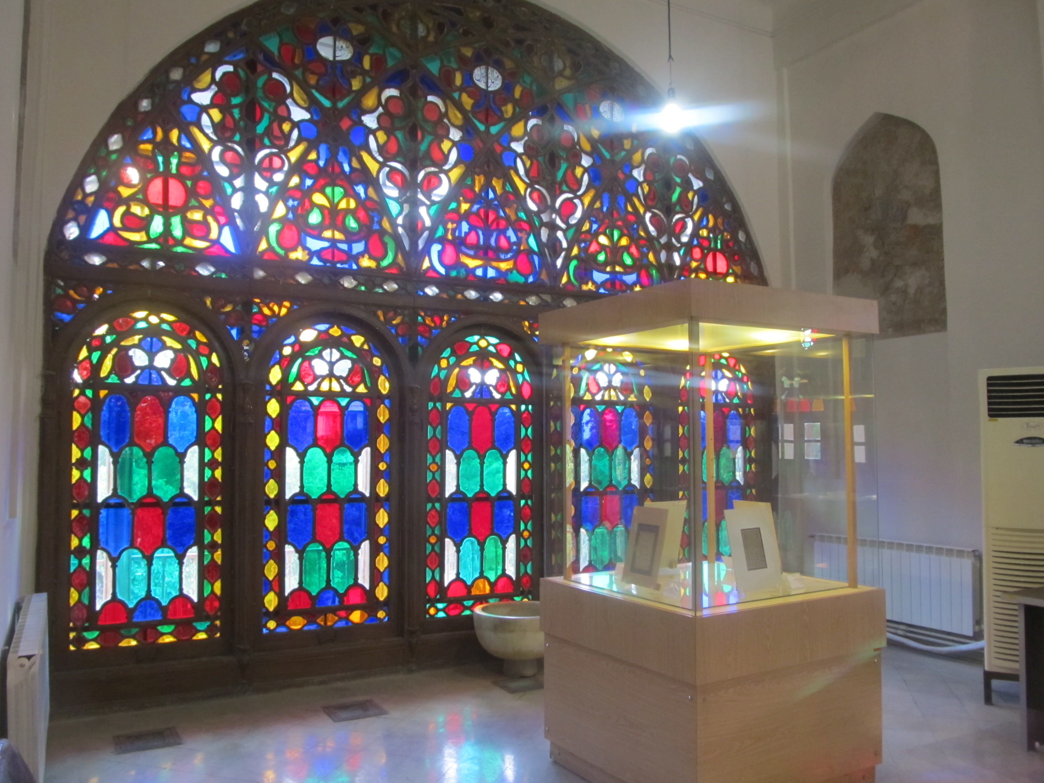 کاخ چهلستون قزوین